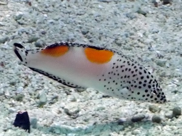 Girelle clown (Coris aygula), juvénile. Photographie prise à l'Aquarium de Liège, le 28 octobre 2011.